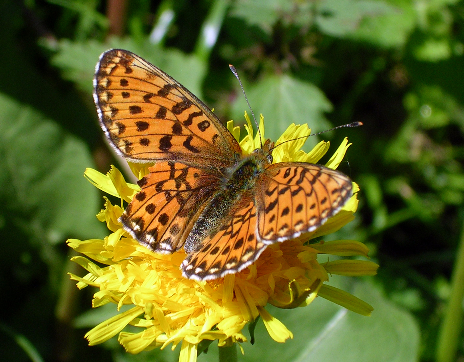 Veilchen-Perlmuttfalter (Boloria euphrosyne) bei Burg Kreuzenstein